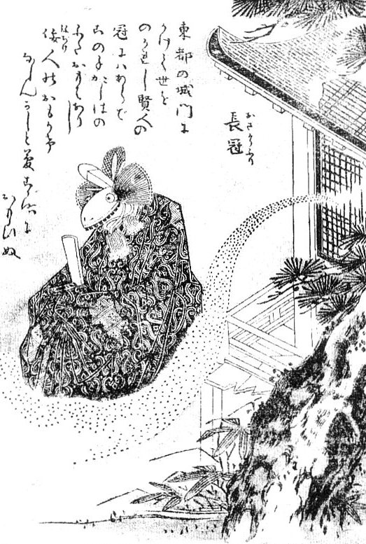 Osakōburi (長冠) from the Gazu Hyakki Tsurezure Bukuro (百器徒然袋)